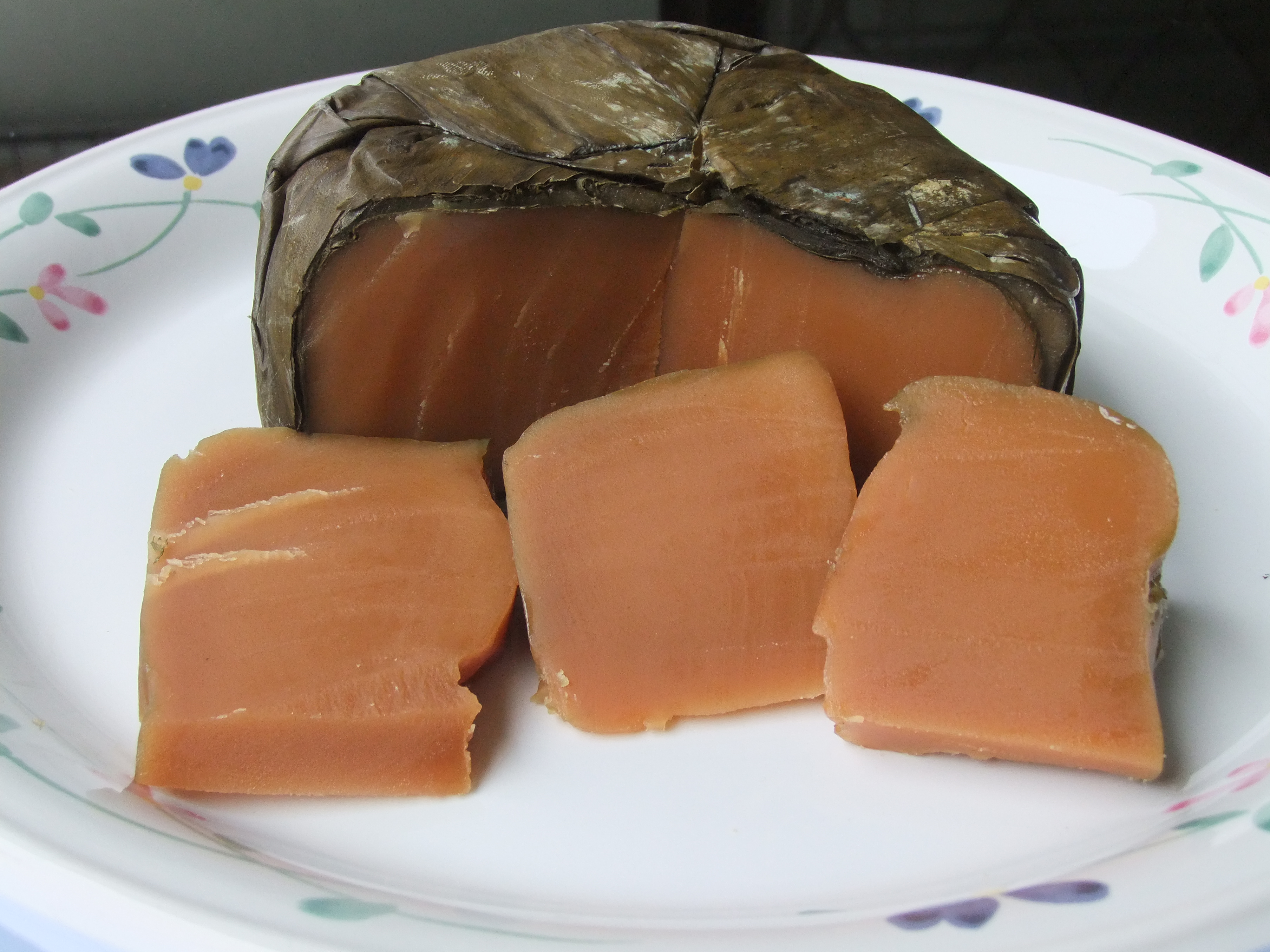 Kue Keranjang